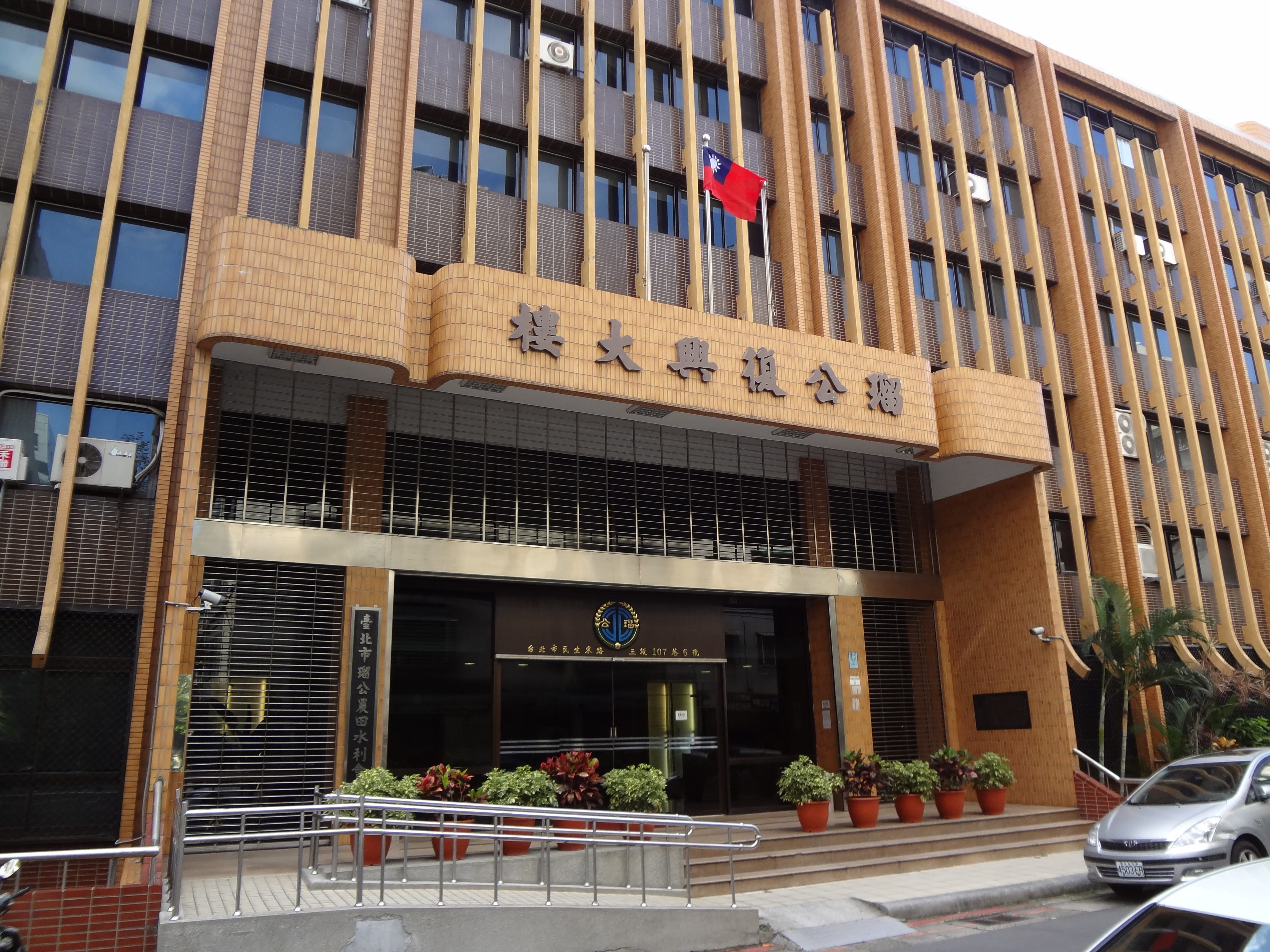 臺北市瑠公農田水利會瑠公復興大樓，地址：臺北市松山區民生東路三段107巷6號。